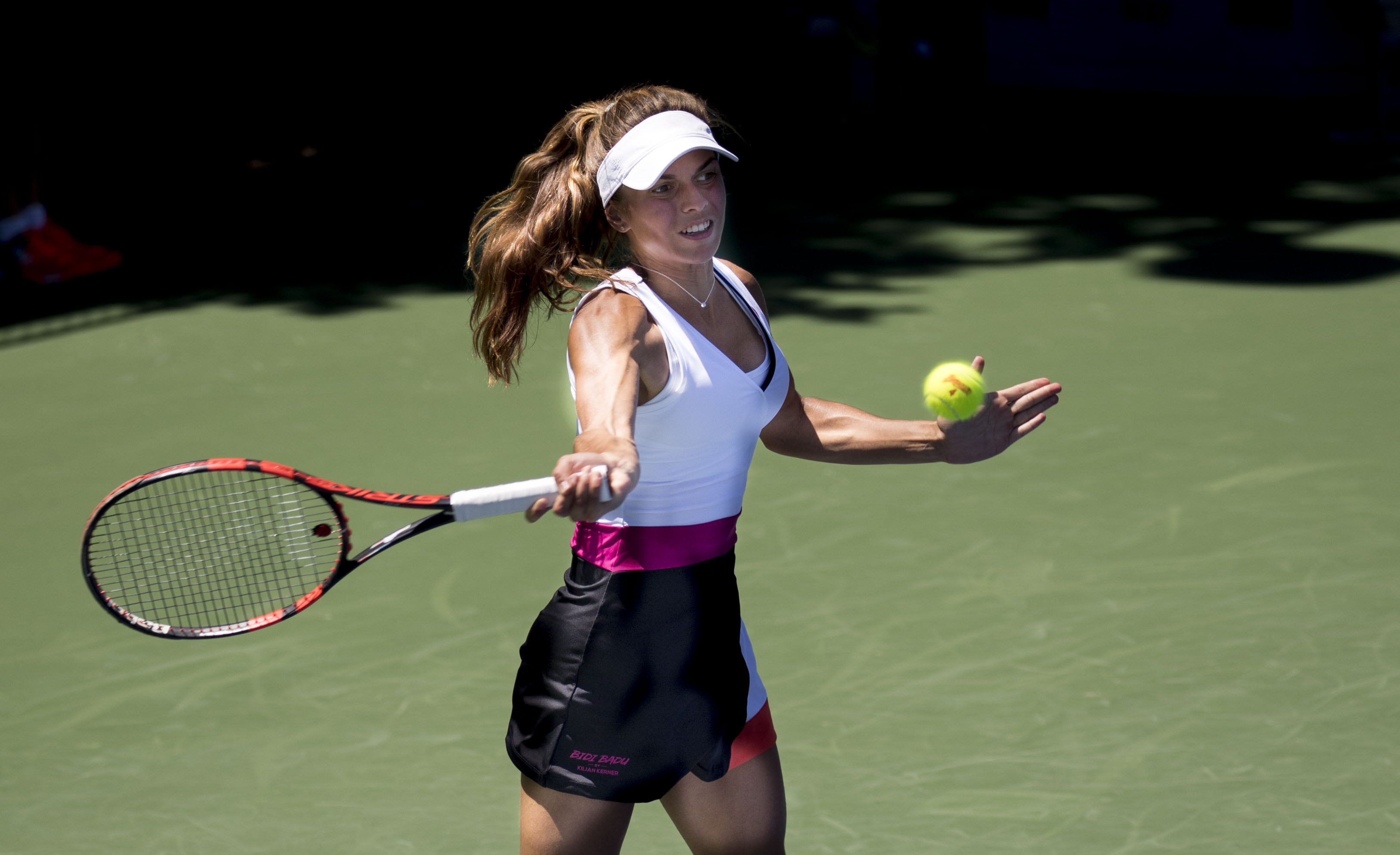 Citi Open Tennis 2017